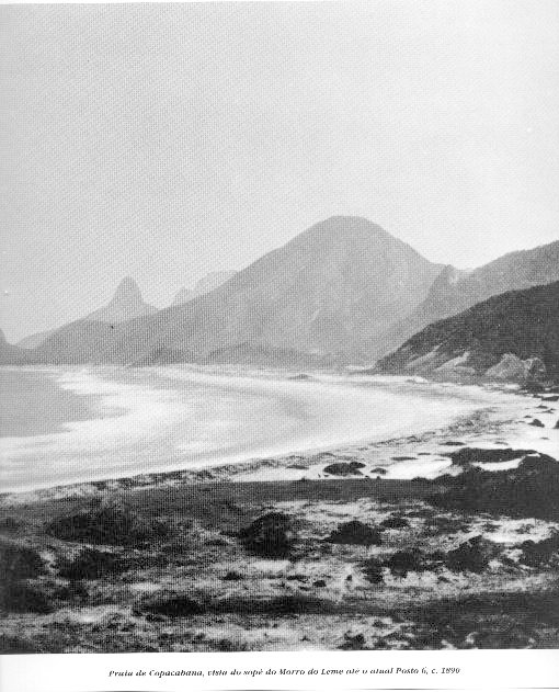 пляж Копакабана в 1890 году